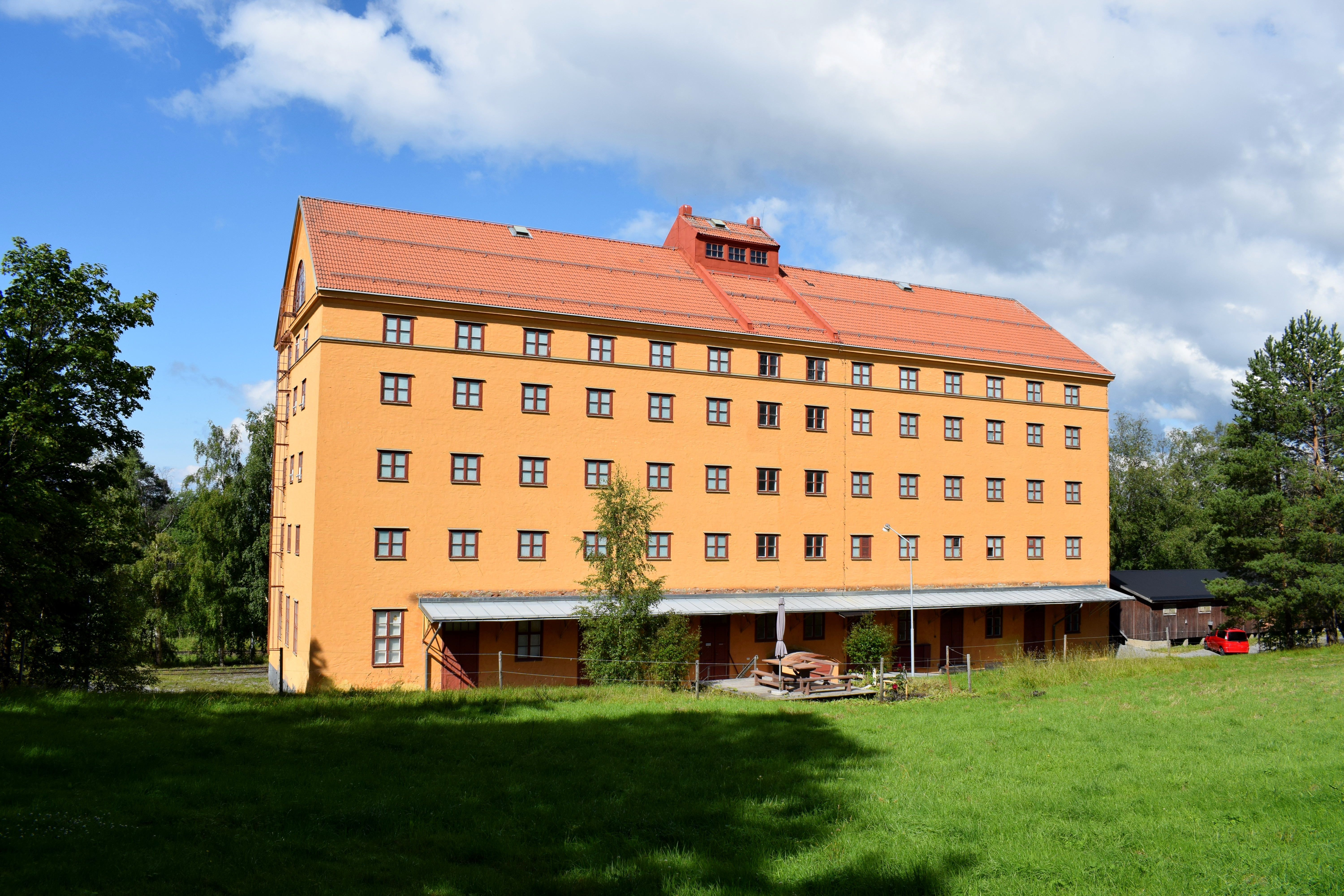 Havremagasinet i Östersund färdigställt 1921. Byggnaden användes åren 1919–1990 av Förplägnadsanstalten i Östersund. År 1990 tog Jämtlands läns museum över byggnaden för att använda den som magasin.